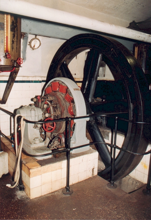 Gleichstromgenerator im Kraftwerk der Festen Obergentringen